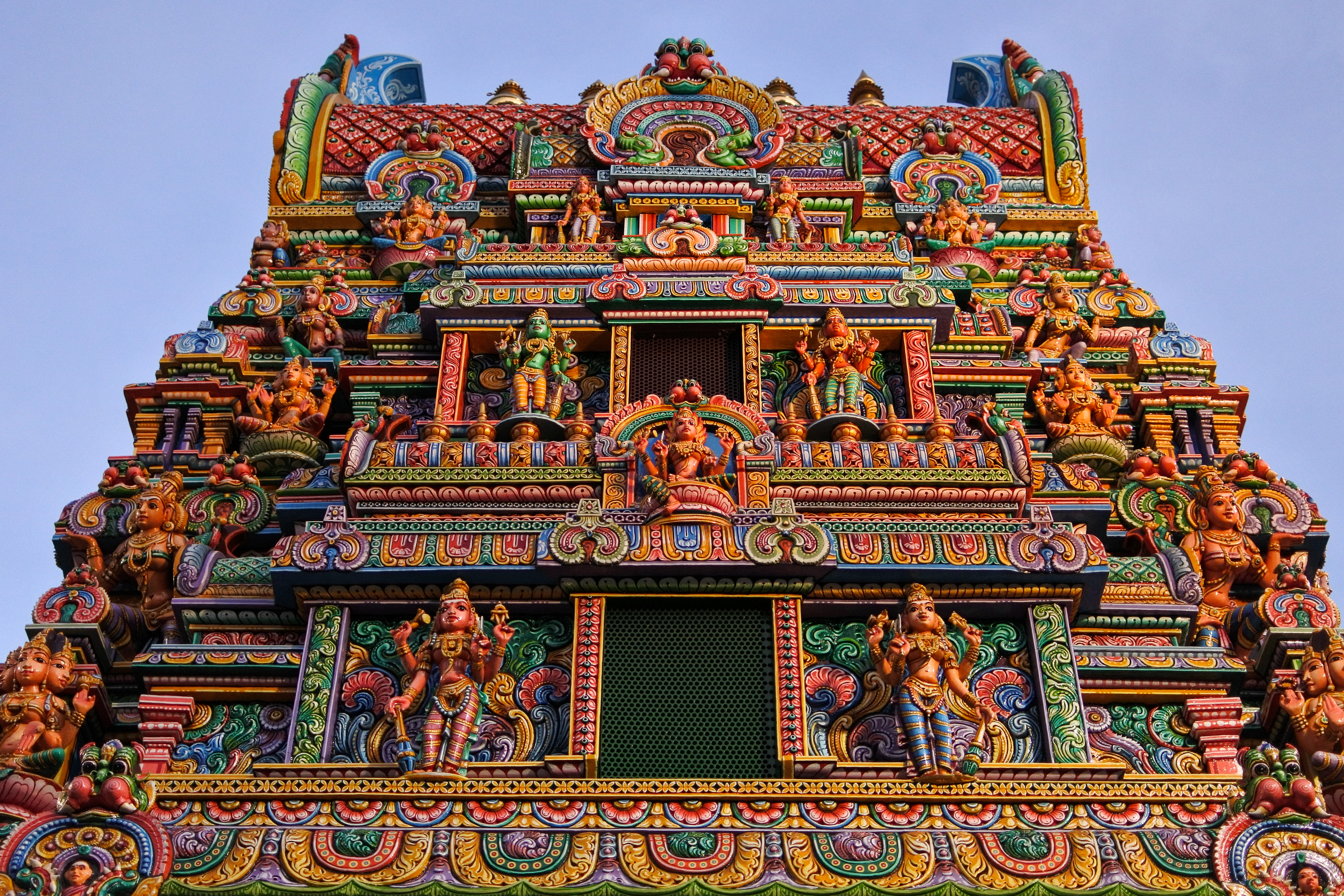 Mariamman Temple, Bangkok June 2015